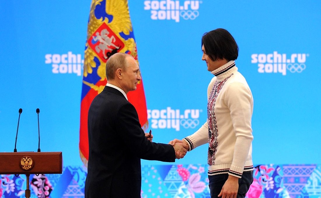 Орденом «За заслуги перед Отечеством» четвёртой степени награждён двукратный олимпийский чемпион в фигурном катании Максим Траньков.